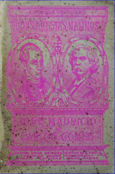 Capa do livro Dous artistas máximos: José Maurício e Carlos Gomes, do Visconde de Taunay.